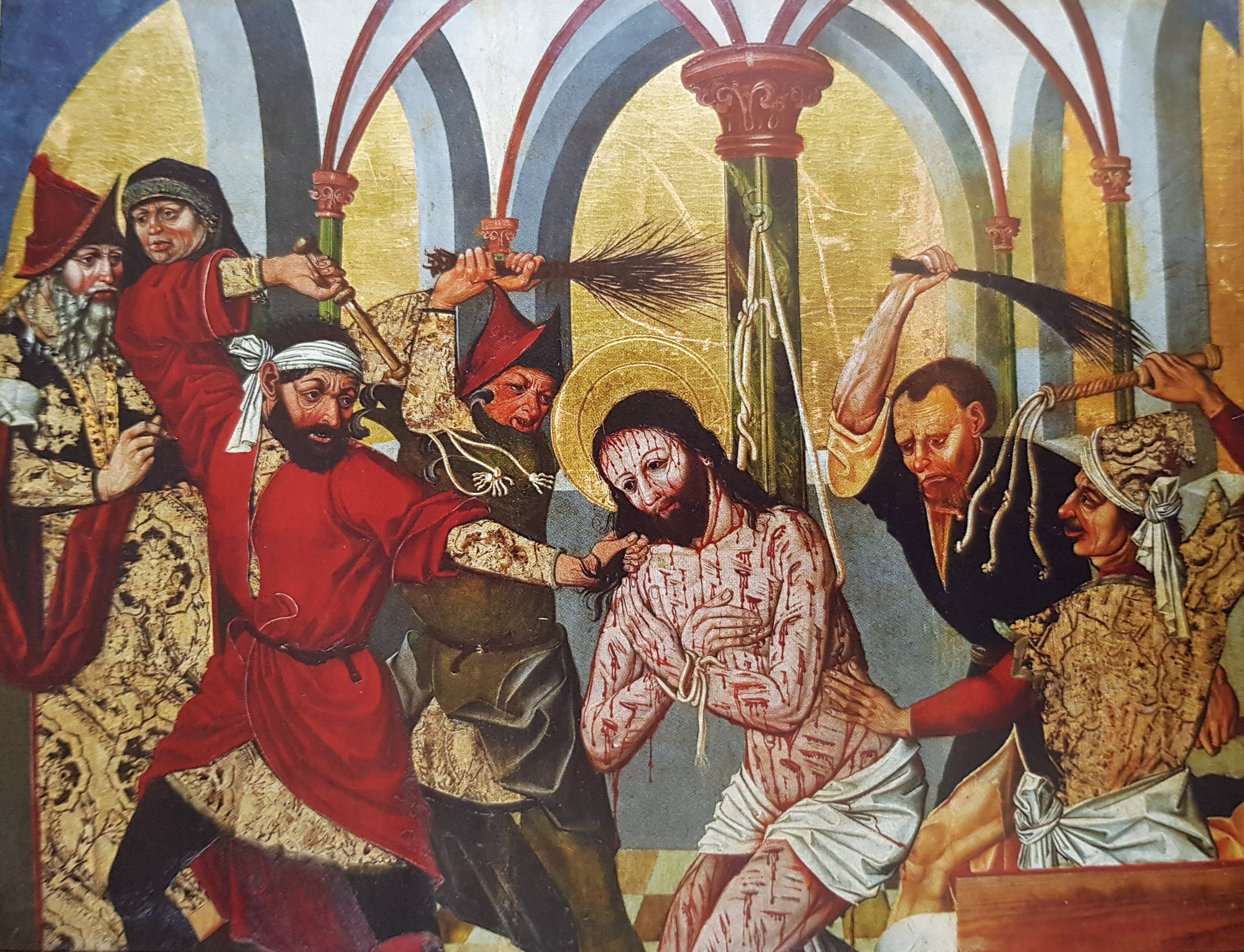 Warsztat Mistrza Lat 1486-1487, Polipyk z kościoła NMP na Piasku we Wrocławiu, scena Biczowania Chrystusa, Muzeum Narodowe we Wrocławiu